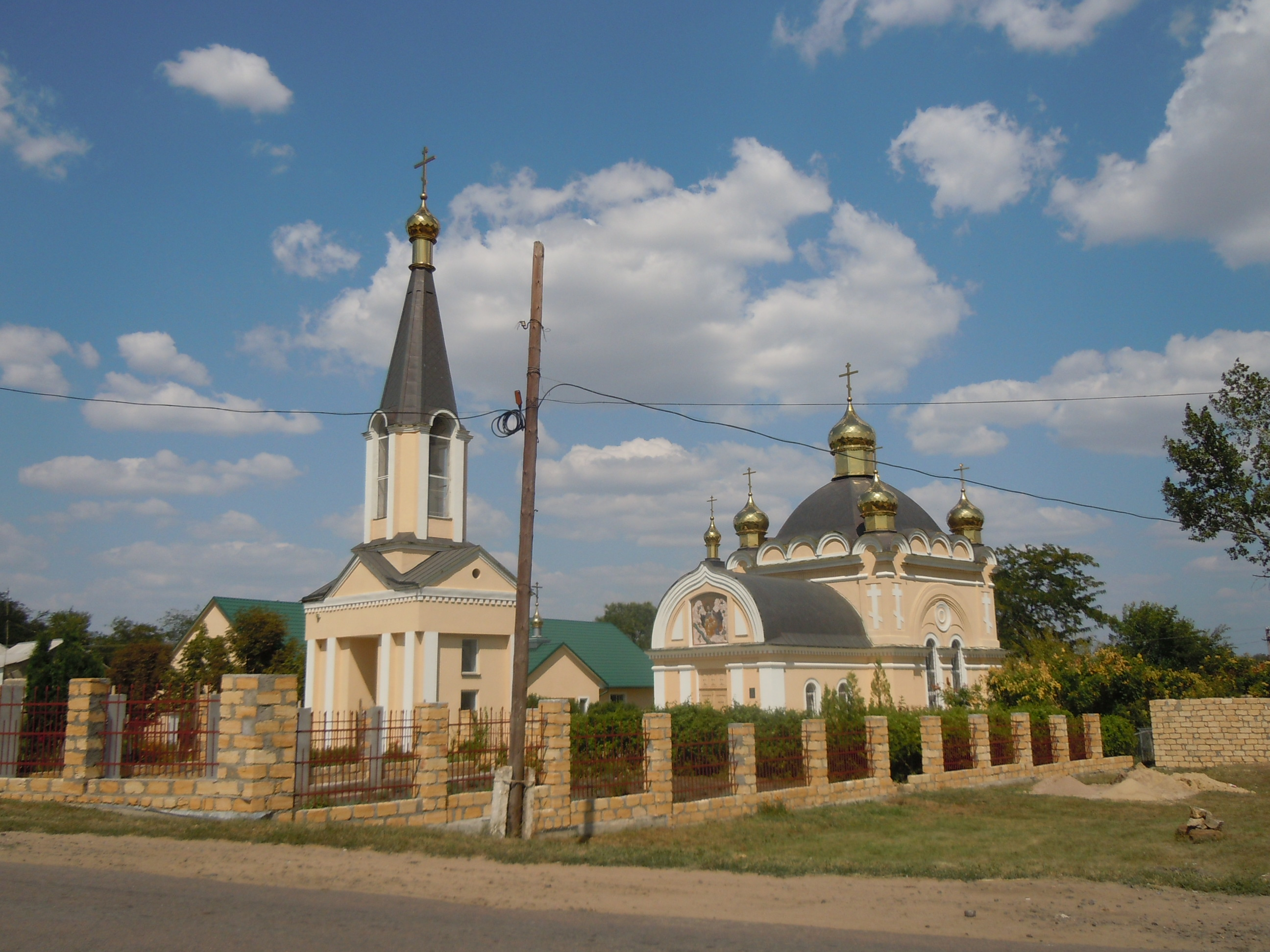 Церква Св. Іллі, с. Іллінка, Біляївський район Одеської області